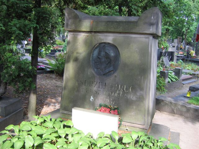 Andrzej Strug's monument (Powązki Cemetery; Cmentarz Komunalny, d. Wojskowy)